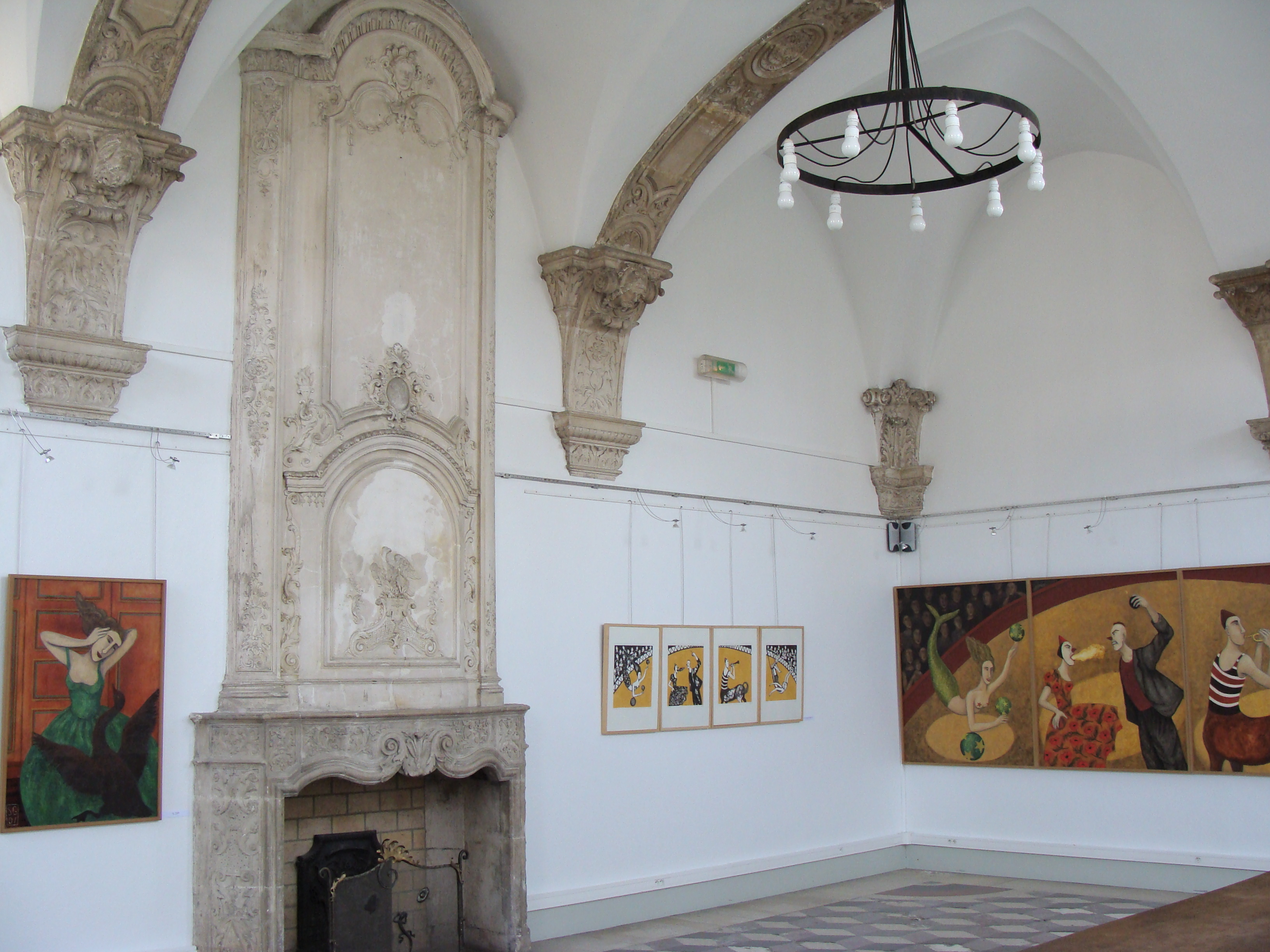 Parloir des Moines, abbaye des Prémontrés de Pont-à-Mousson